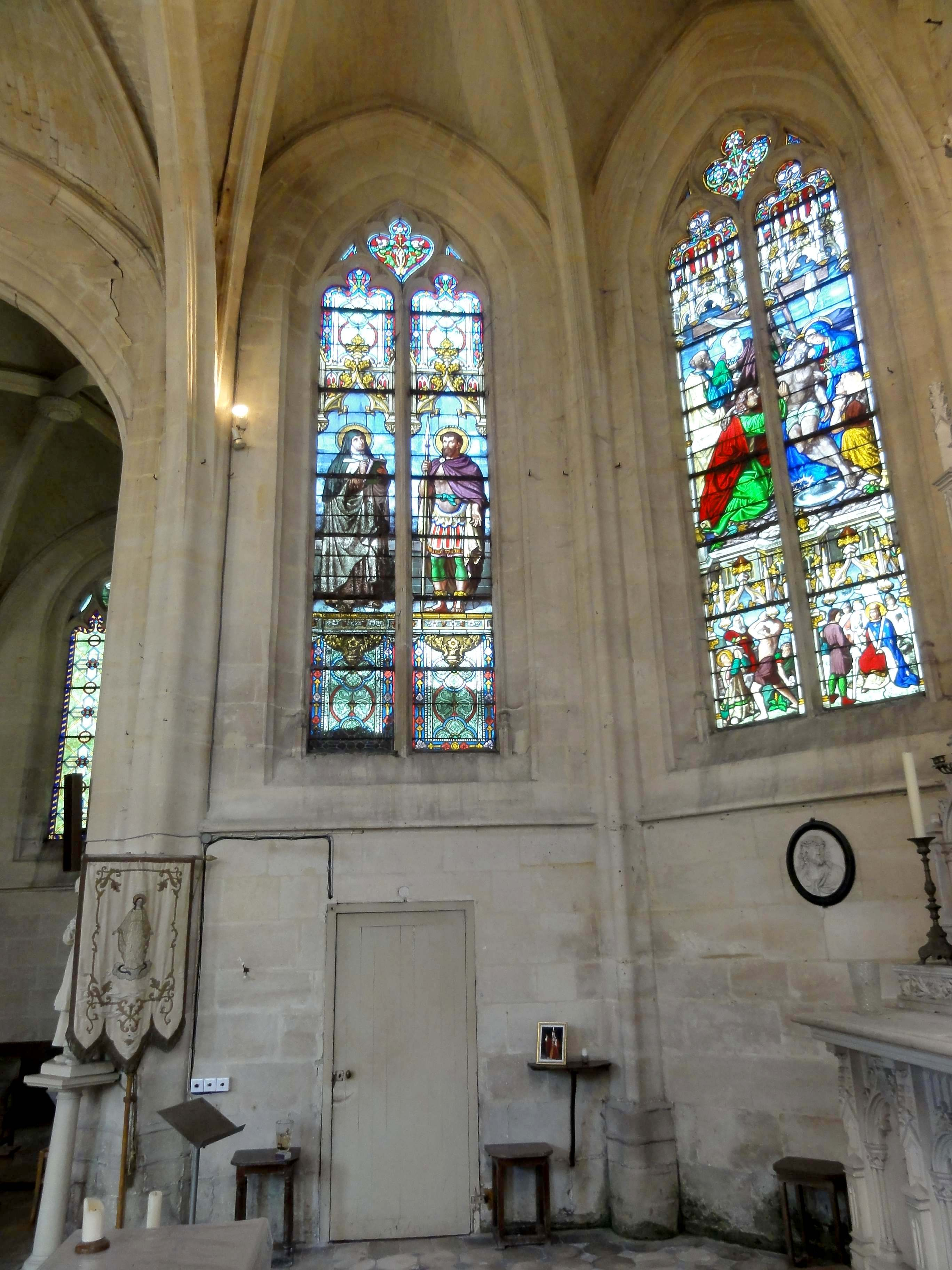 Intérieur de l'église (voir titre).